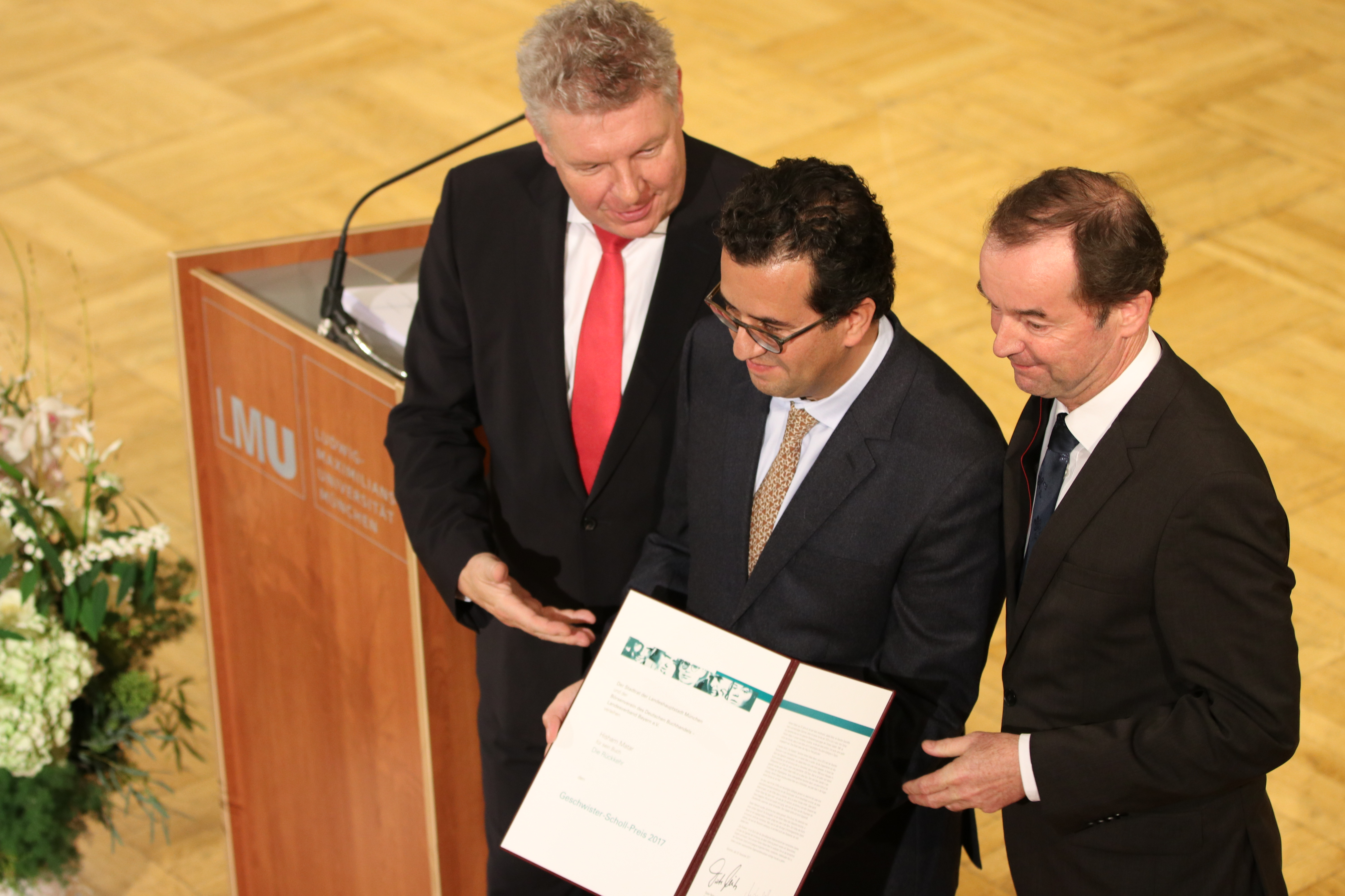 Verleihung des Geschwister-Scholl-Preises 2017 an Hisham Matar für seinen Buch "Die Rückkehr" durch Michael Then, Vorsitzender des Börsenvereins des Deutschen Buchhandels - Landesverband Bayern e. V. (rechts) und Dieter Reiter, OB der Landeshauptstadt München (links).